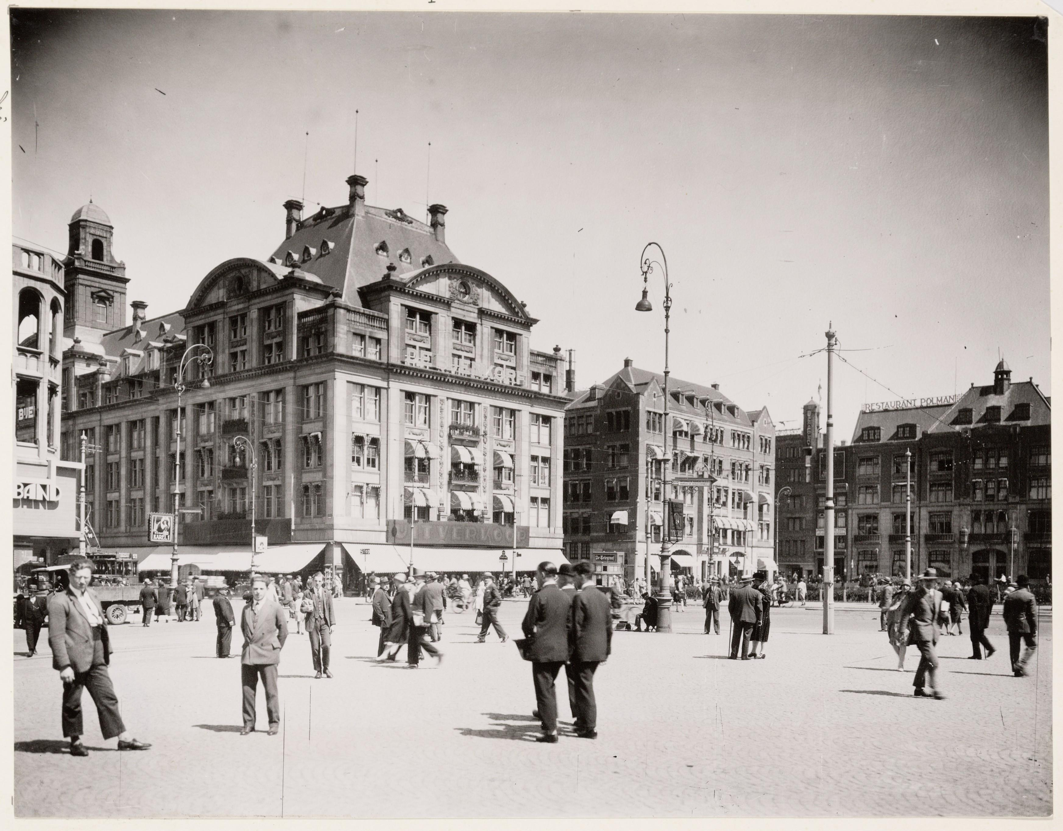 Beschrijving De oostzijde van de Dam, gezien naar De Bijenkorf en Hotel Krasnapolsky en Restaurant Polman Documenttype foto Vervaardiger Onbekend Anoniem Collectie Collectie Stadsarchief Amsterdam: foto-afdrukken Datering 1928 ca. Geografische naam Dam Inventarissen Afbeeldingsbestand OSIM00001004946